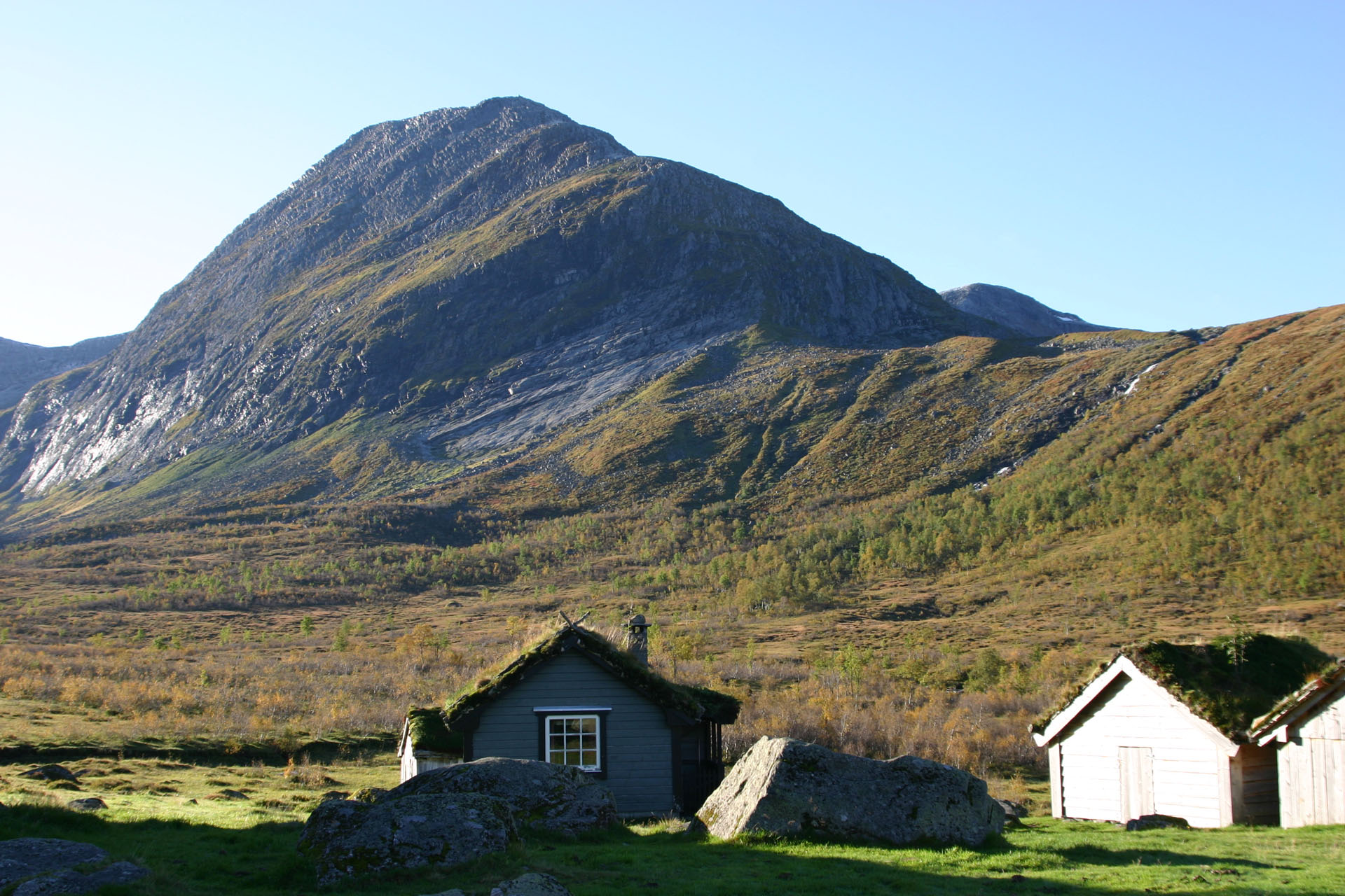 Kragefjellet sett frå Strynesætra i Knutsdalen, Hornindal